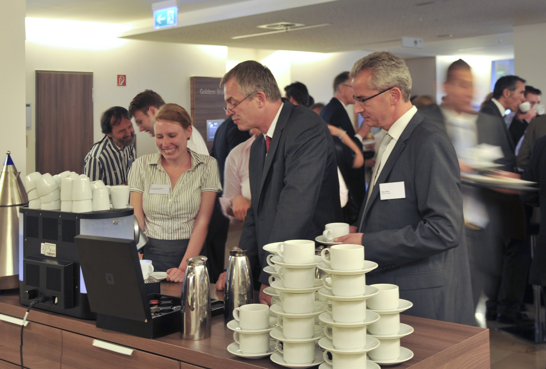 Strommarkt im Umbruch - Perspektiven für NRW Am 23. Juli 2013 veranstaltete die EnergieAgentur.NRW in Kooperation mit dem Ministerium für Klimaschutz, Umwelt, Landwirtschaft, Natur- und Verbraucherschutz des Landes Nordrhein-Westfalen eine Tagung zum Thema "Strommarkt im Umbruch - Perspektiven für NRW" im Meliá Hotel in Düsseldorf. Schwerpunkt der Veranstaltung war die Diskussion über die Modelle zur Gewährleistung der Versorgungssicherheit. Weitere Informationen: bit.ly/139DVgt Flickr tags: NRW; Germany; Versorgung; Düsseldorf; Ministerium für Klimaschutz; Nordrhein-Westfalen; Tagung; Strommarkt